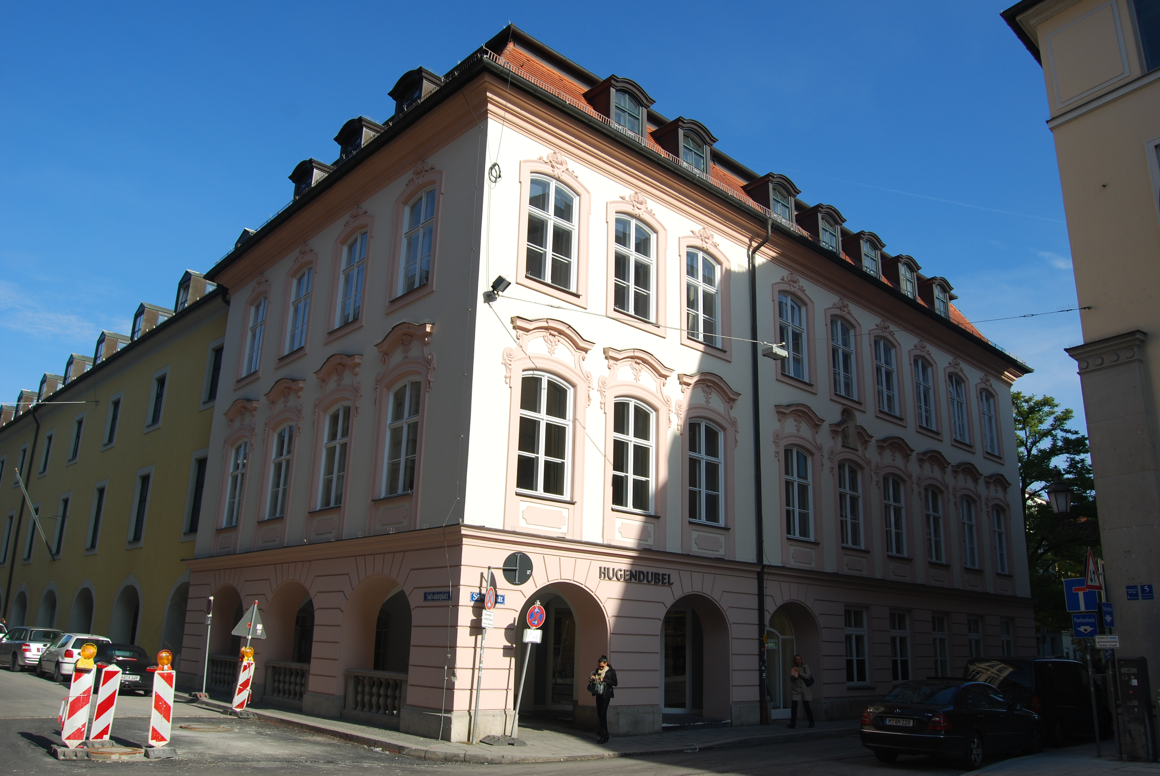 Ehemaliges Stammhaus der Buchhandlung Hugendubel am Salvatorplatz in München, Salvatorplatz 2